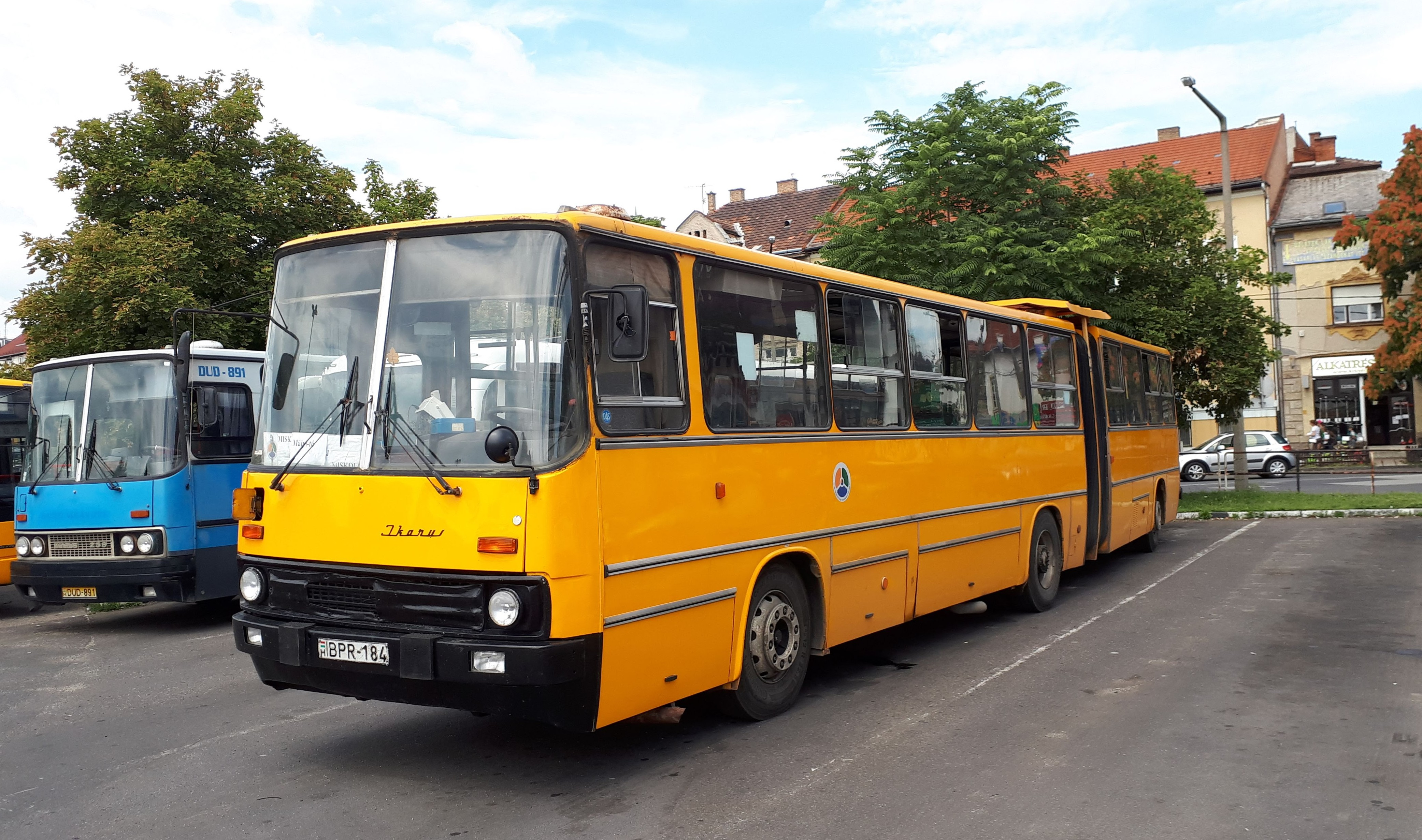 Az ÉMKK BPR-184 rendszámú Ikarus 280 típusú busza Miskolcon, a 3740-es helyközi járaton.